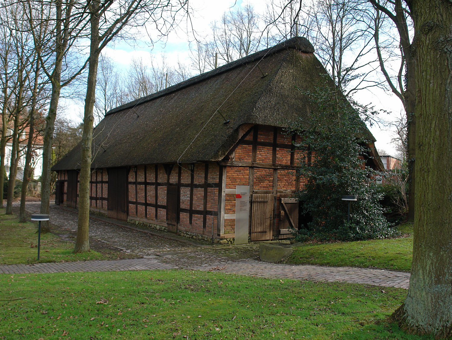 Focke-Museum Bremen: Tarmstedter Scheune (1803)